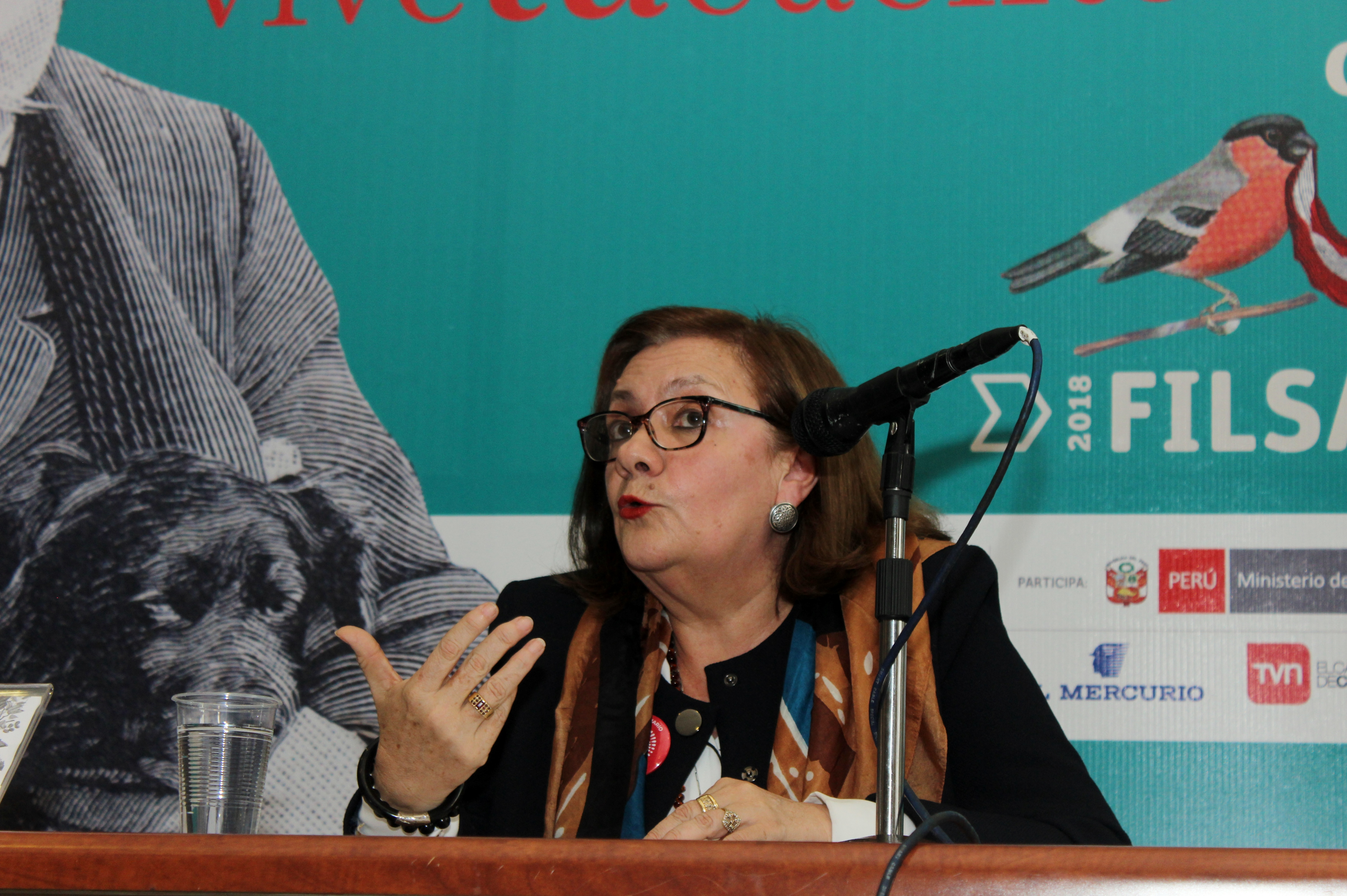 La historiadora peruana Carmen Mc Evoy durante la presentación de su libro Guerreros civilizadores. Sociedad política y cultura durante la Guerra del Pacífico, 1879-1884 en la Feria Internacional del Libro de Santiago 2018 sala Pedro Prado, 26 de octubre).